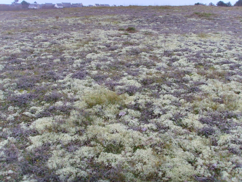 Lichens du genre Cladonia dominants sur dune littoral (Trez Goarem, Primelin, Finistère, France)